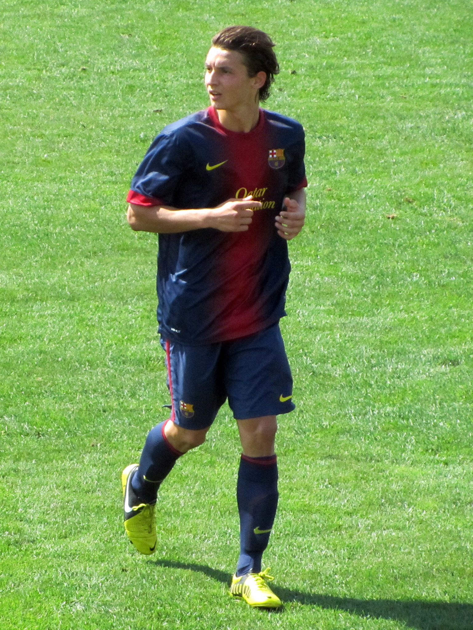 David Babunski in a 2012-13 FC Barcelona/FC Barcelona B home kit. Foto realizada por Javier Segura (@castroquini)